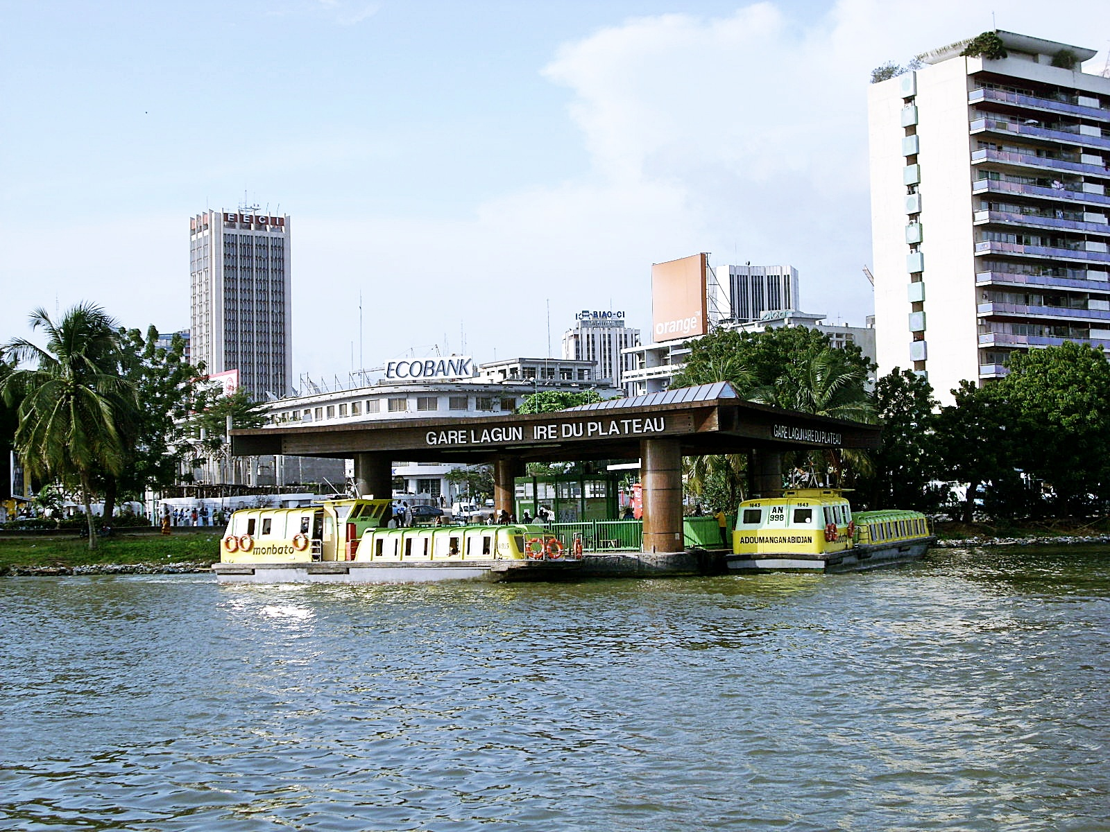 Gare lagunaire de bateaux-bus desservant le quartier d'affaires du Plateau, à Abidjan.